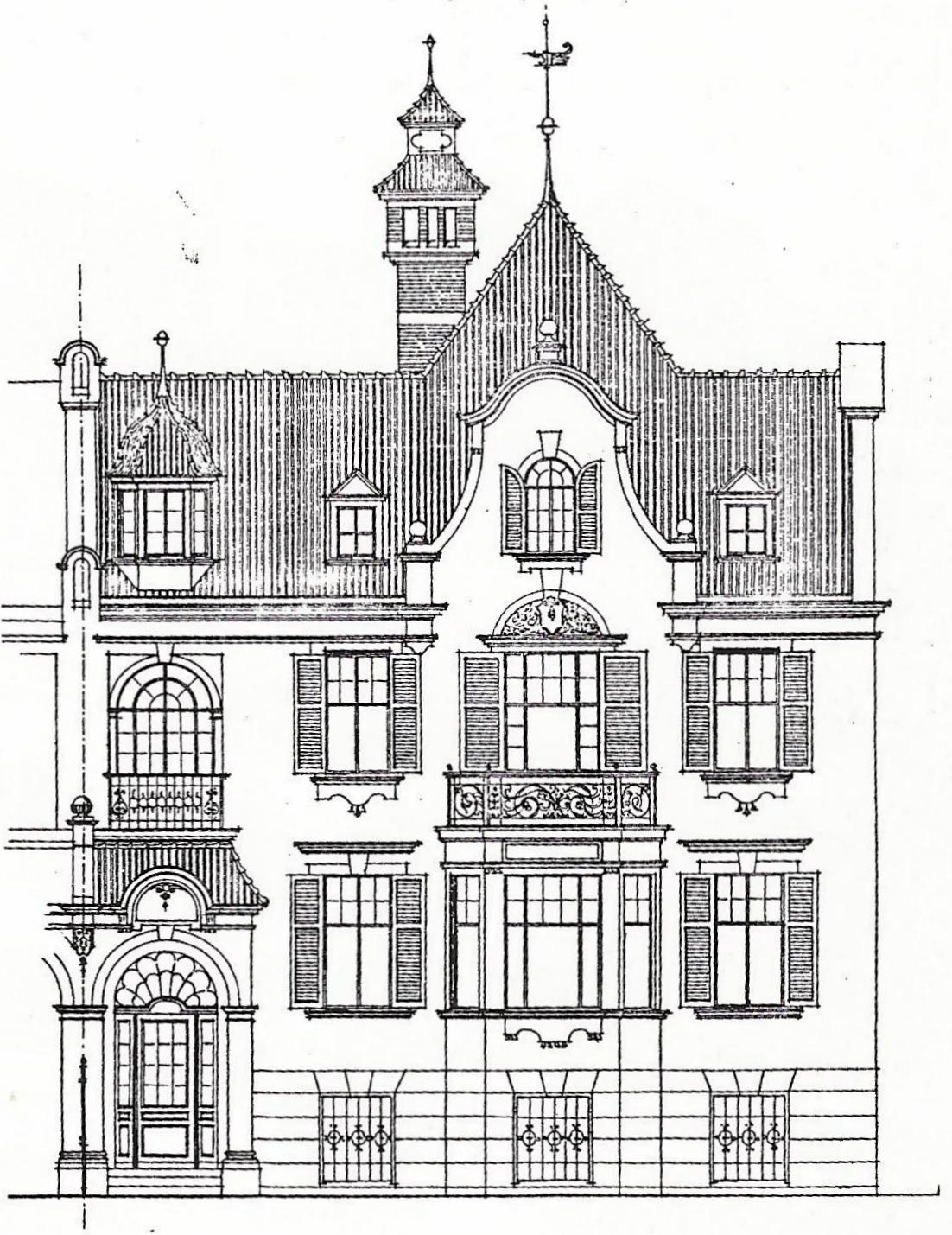 Doppelvilla Finkler, Bonn: Aufriss der Straßenfront der Halbvilla Tempelstraße 1